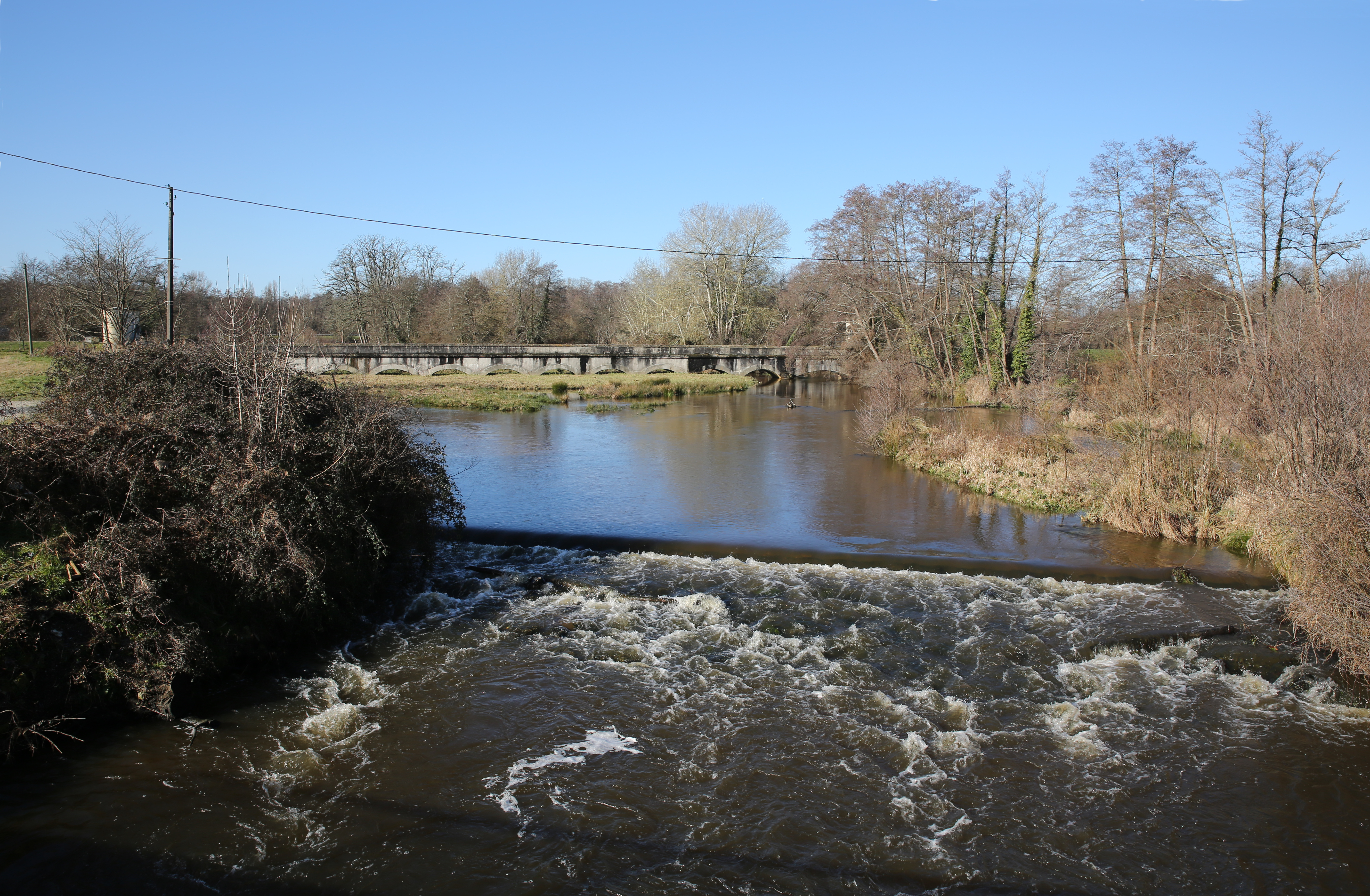 Jalepont - Point de franchissement de la Jalle